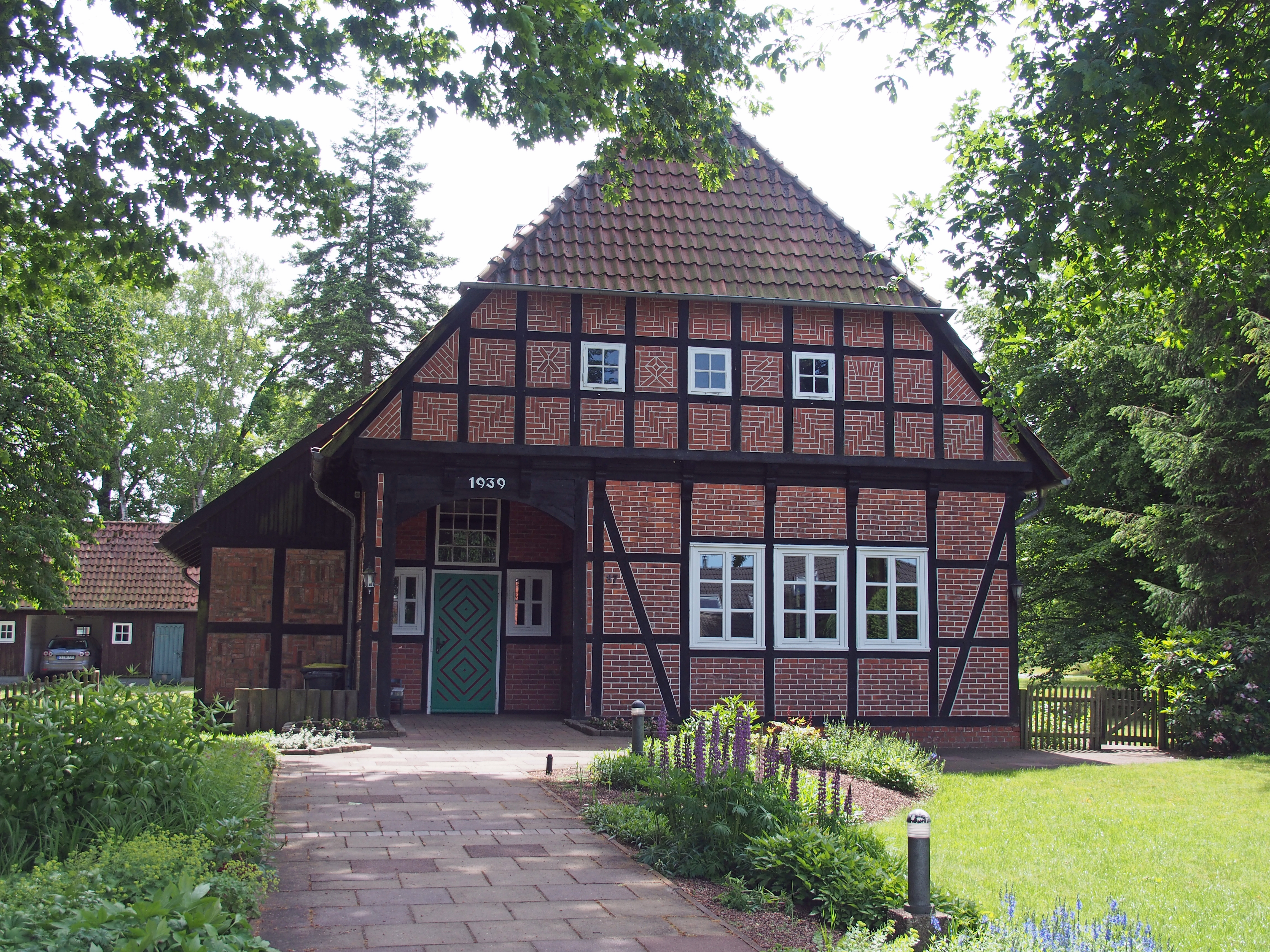 Dorfgemeinschaftshaus in Hustedt-Jägerei von 1939, Stadt Celle, Niedersachsen (Germany)